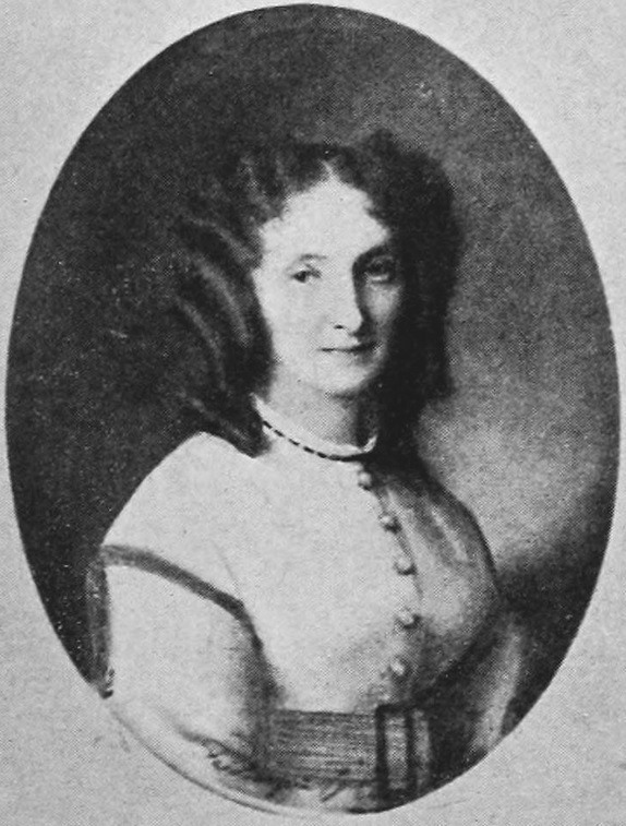 "Portrait d'Agathina Weill, née Marx, à l'âge de cinquante ans".